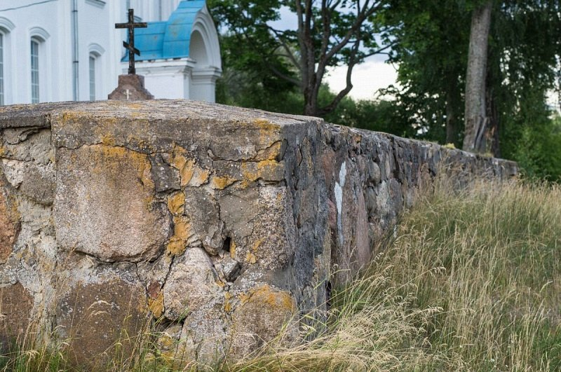 Ручыца. Царква. Агароджа